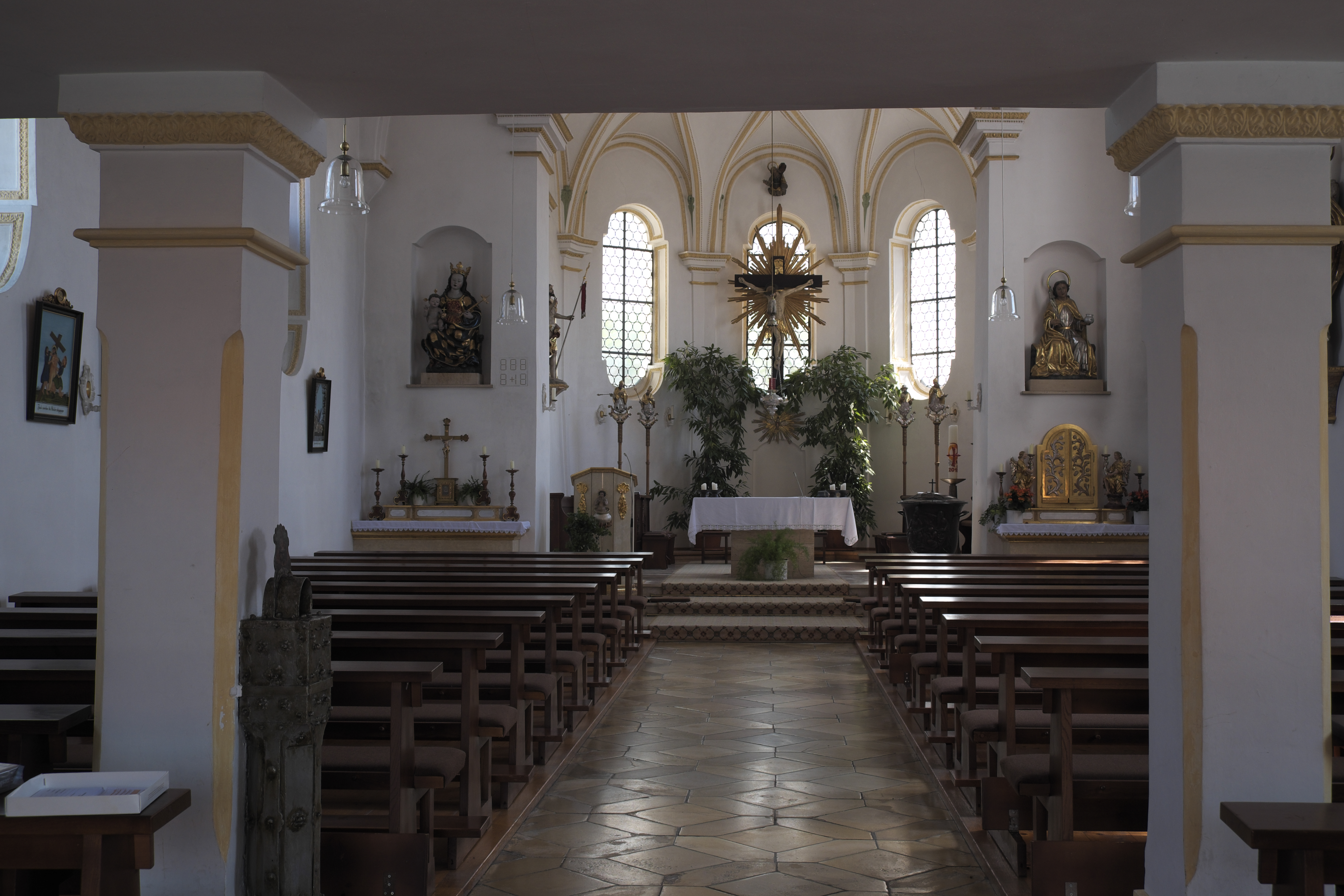 Katholische Pfarrkirche St. Veit in Erling, einem Ortsteil der Gemeinde Andechs im Landkreis Starnberg (Bayern/Deutschland), Innenraum